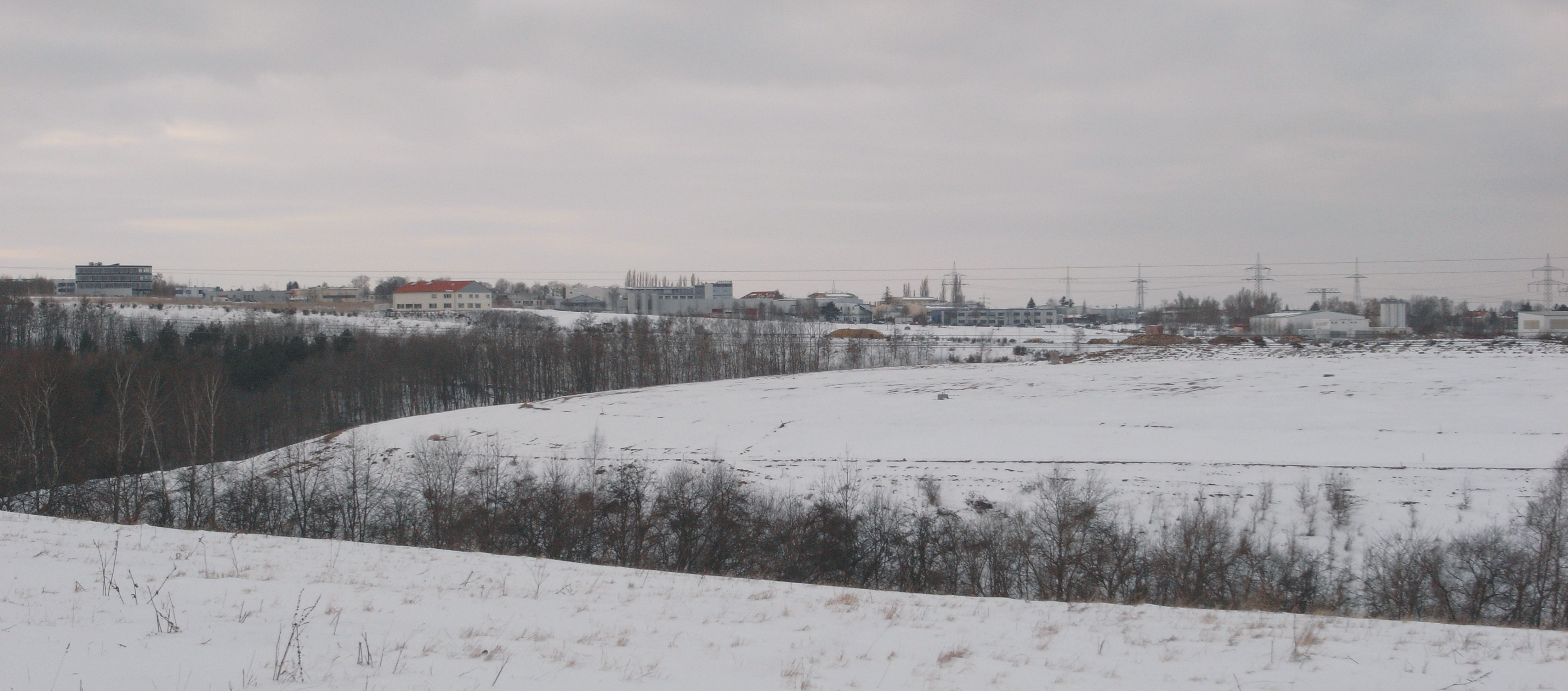 Dresden Coschütz/Gittersee, Gewerbegebiet (Deutschland, Sachsen), im Mittelgrund des Bildes die abgedeckte Halde des früheren Steinkohlenwerks "Willi Agatz".